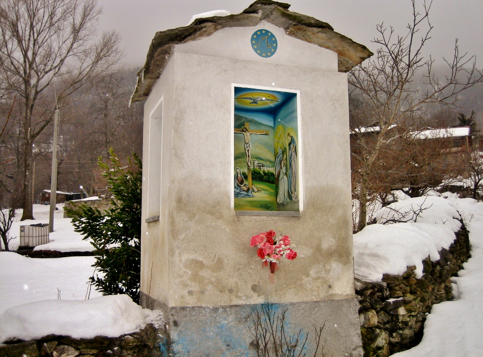 Borgata Pognant (San Giorio di Susa) Pilone Votivo in Regione Garin.